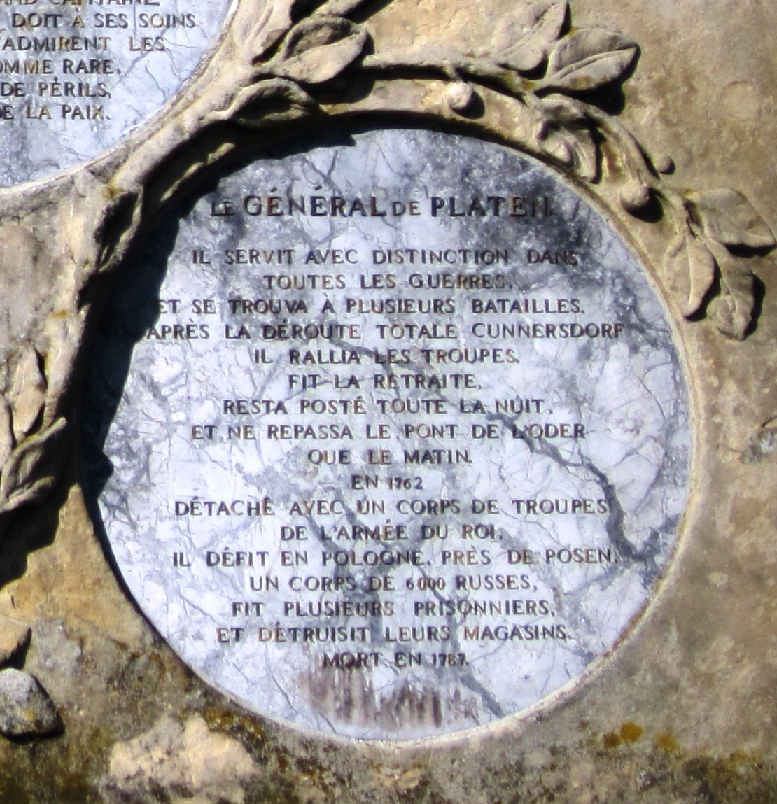 Ehrentafel für Dubislaw von Platen (1714–1787) am Obelisken in Rheinsberg